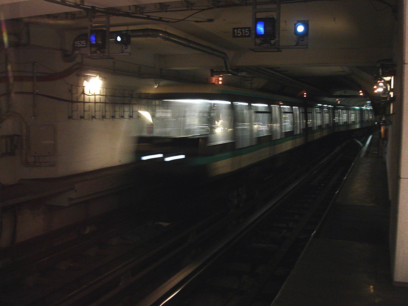 Retournement d'une rame MP 89 CA après la station Olympiades de la ligne 14 du métro de Paris, France